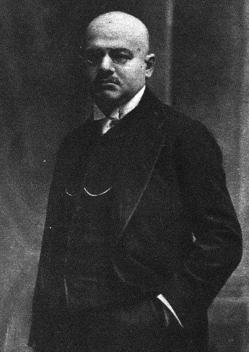 Leo FallLeo Fall (1873–1925), Austrian composer